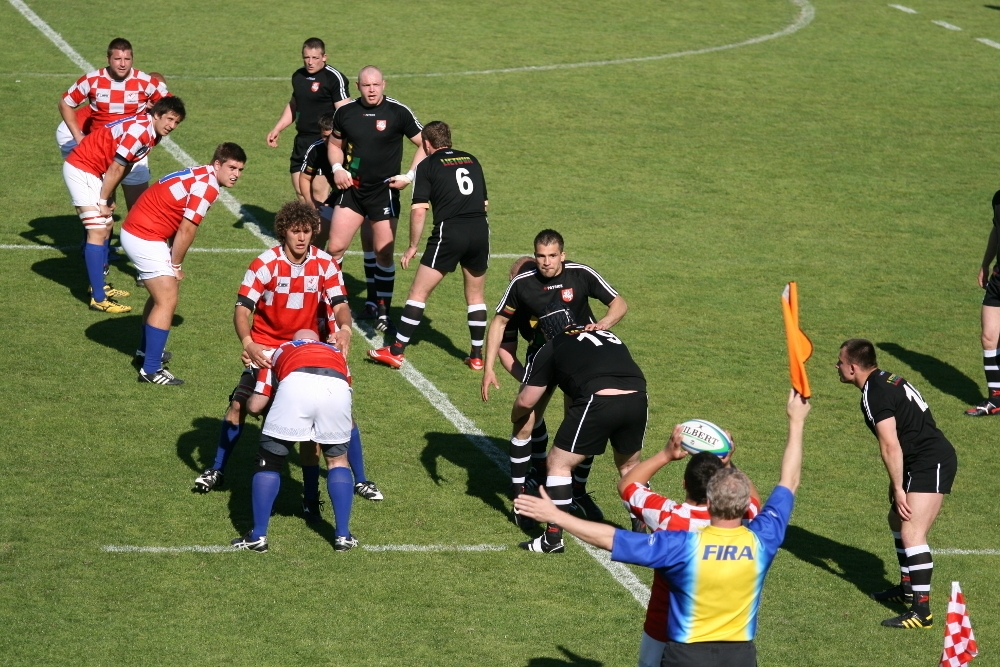 ragbi utakmica Hrvatska - Litva 7. svibnja 2011. godine